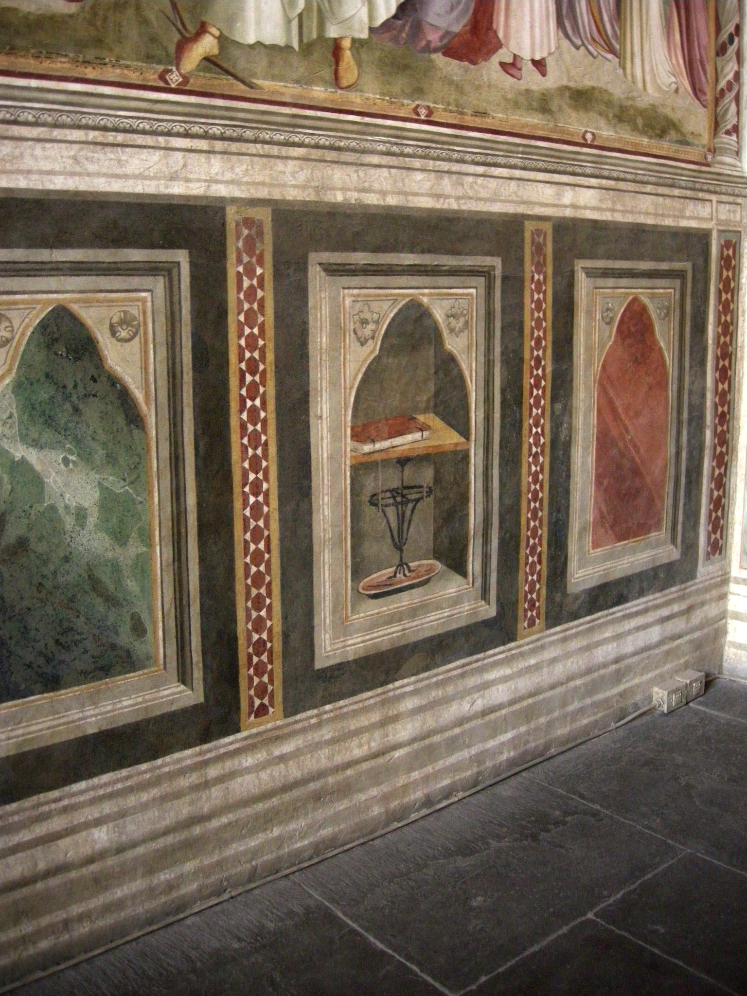 Cappella baroncelli, coretti di tadeo gaddi